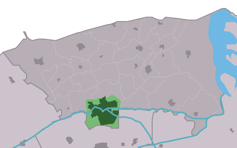 Kaartsje fan himrik fan Dokkum